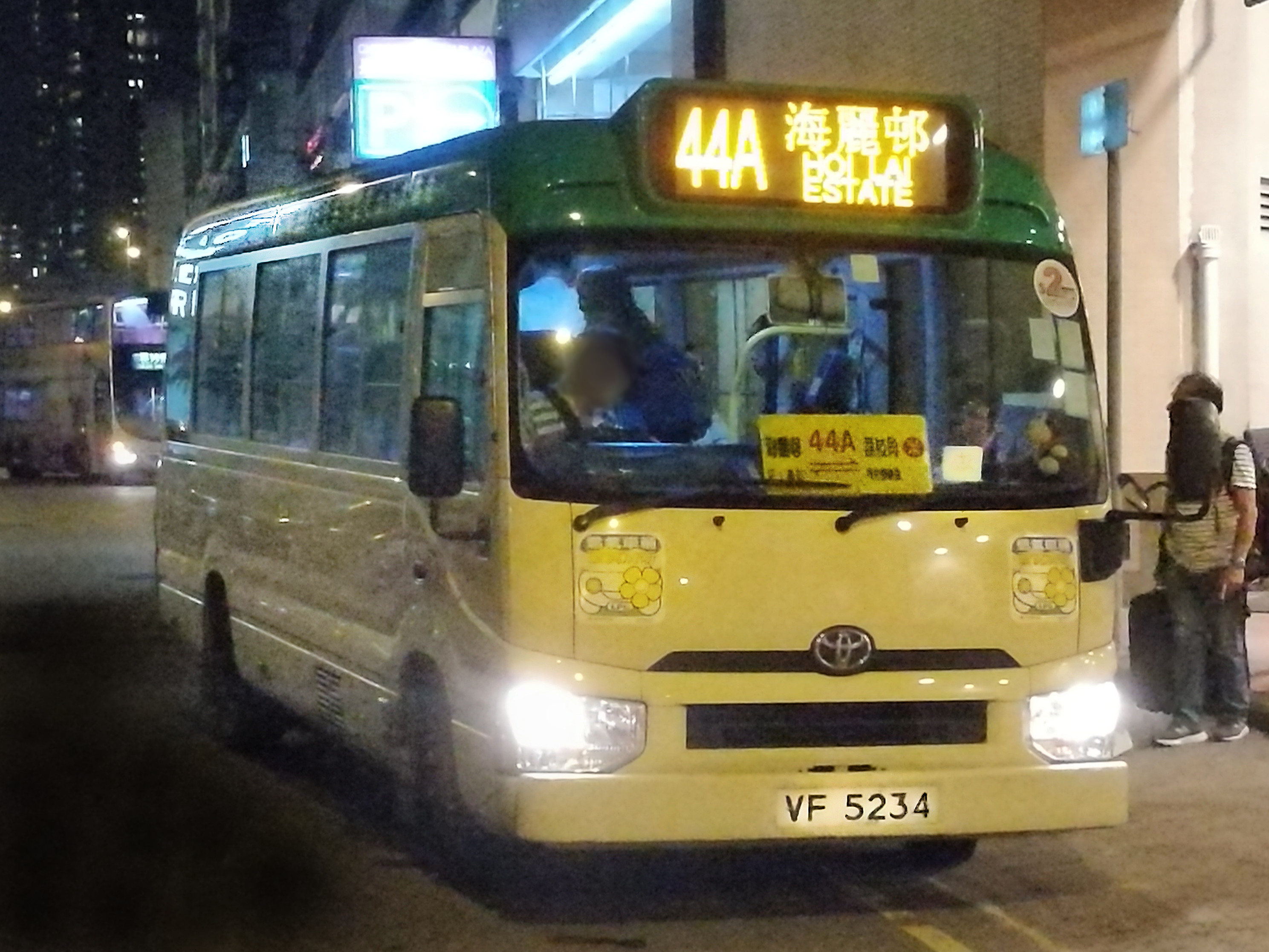 小巴VF5234的照片